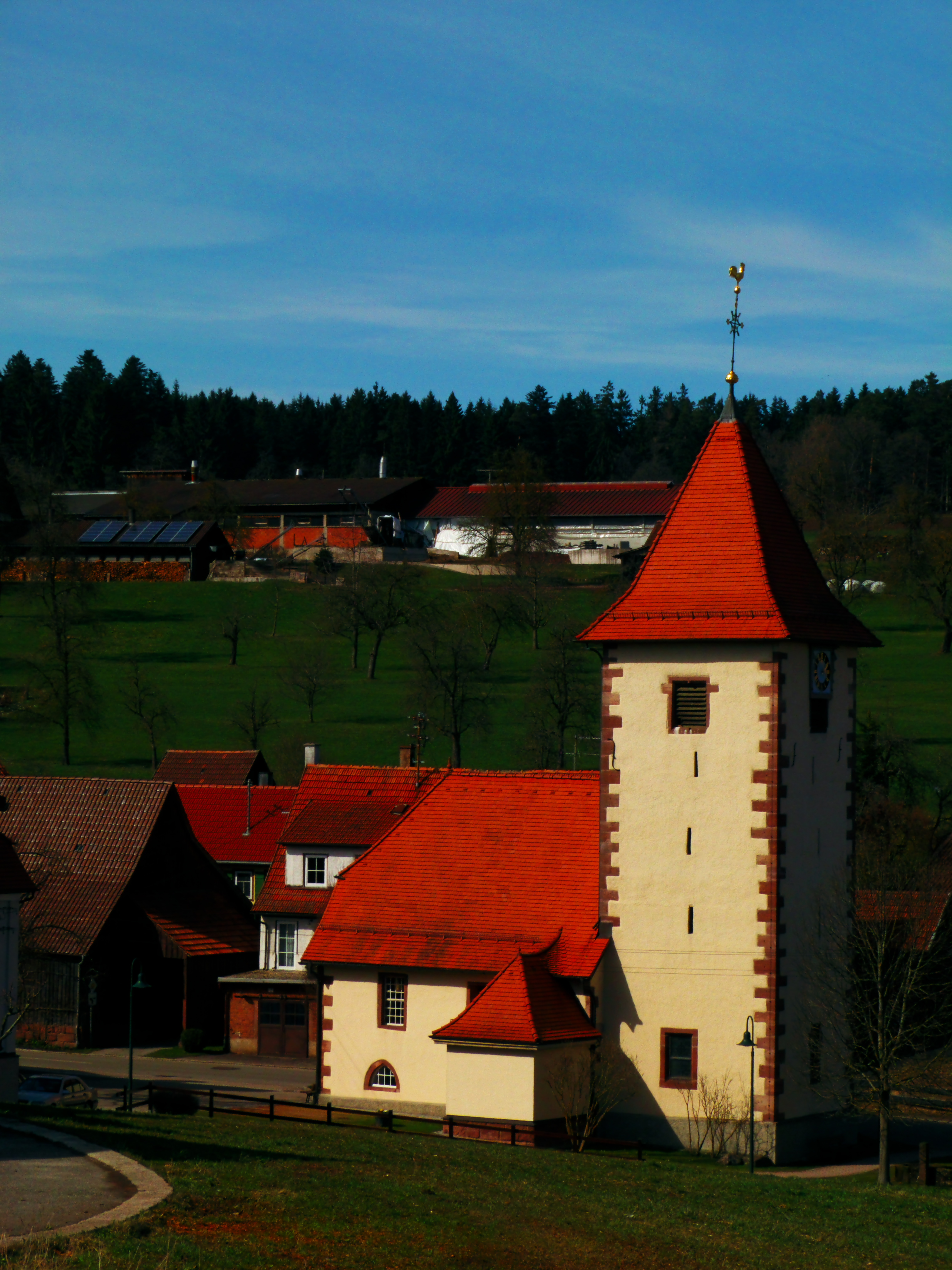 Church Of Oberkollwangen